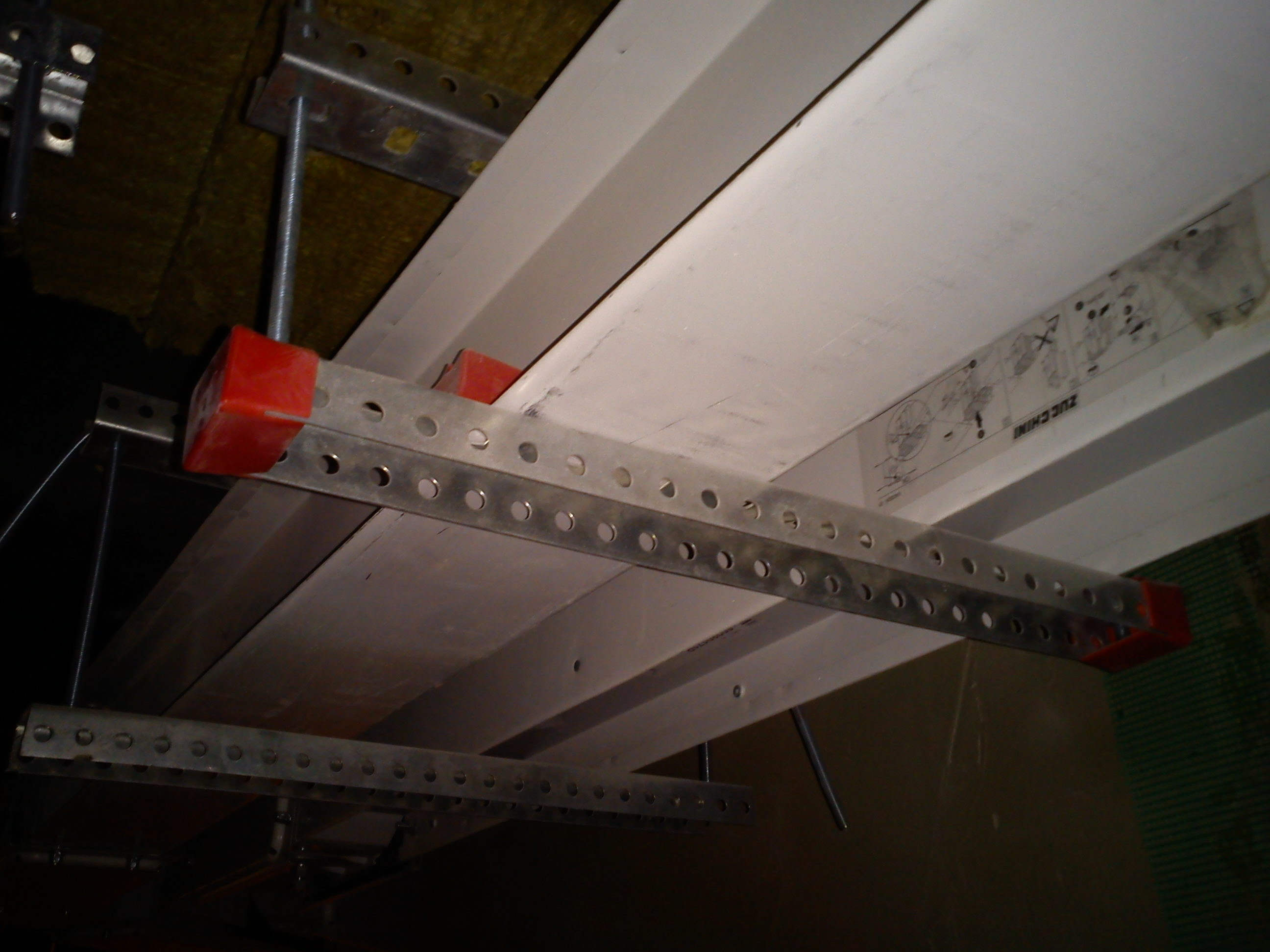 Зображення магістрального шинопроводу 800А і його кріплення за допомогою шпильки та металевого профілю